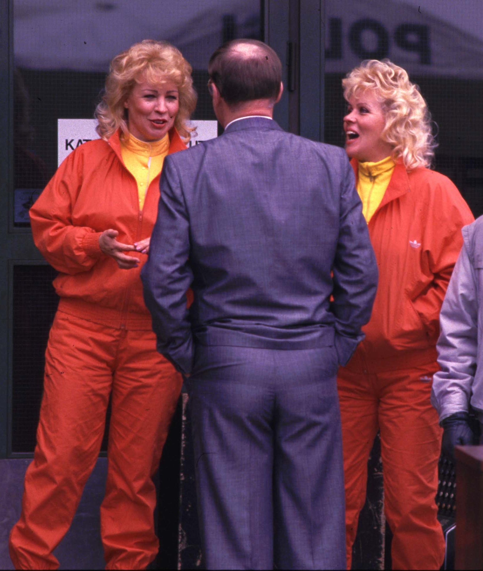 KOivistolaiset group